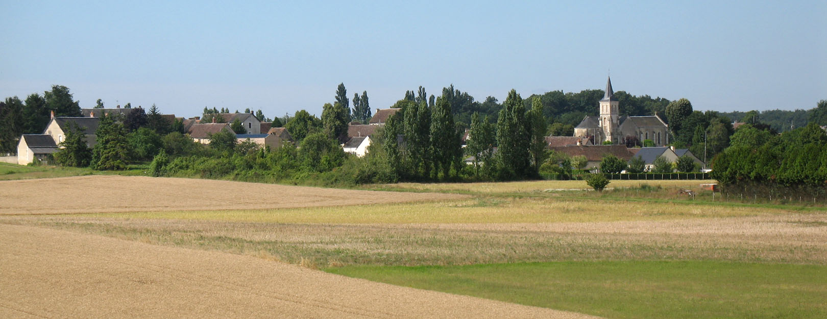 Cussay, vue de la route de Ligueil, Indre-et-loire, France